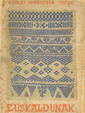 Liburuko azala